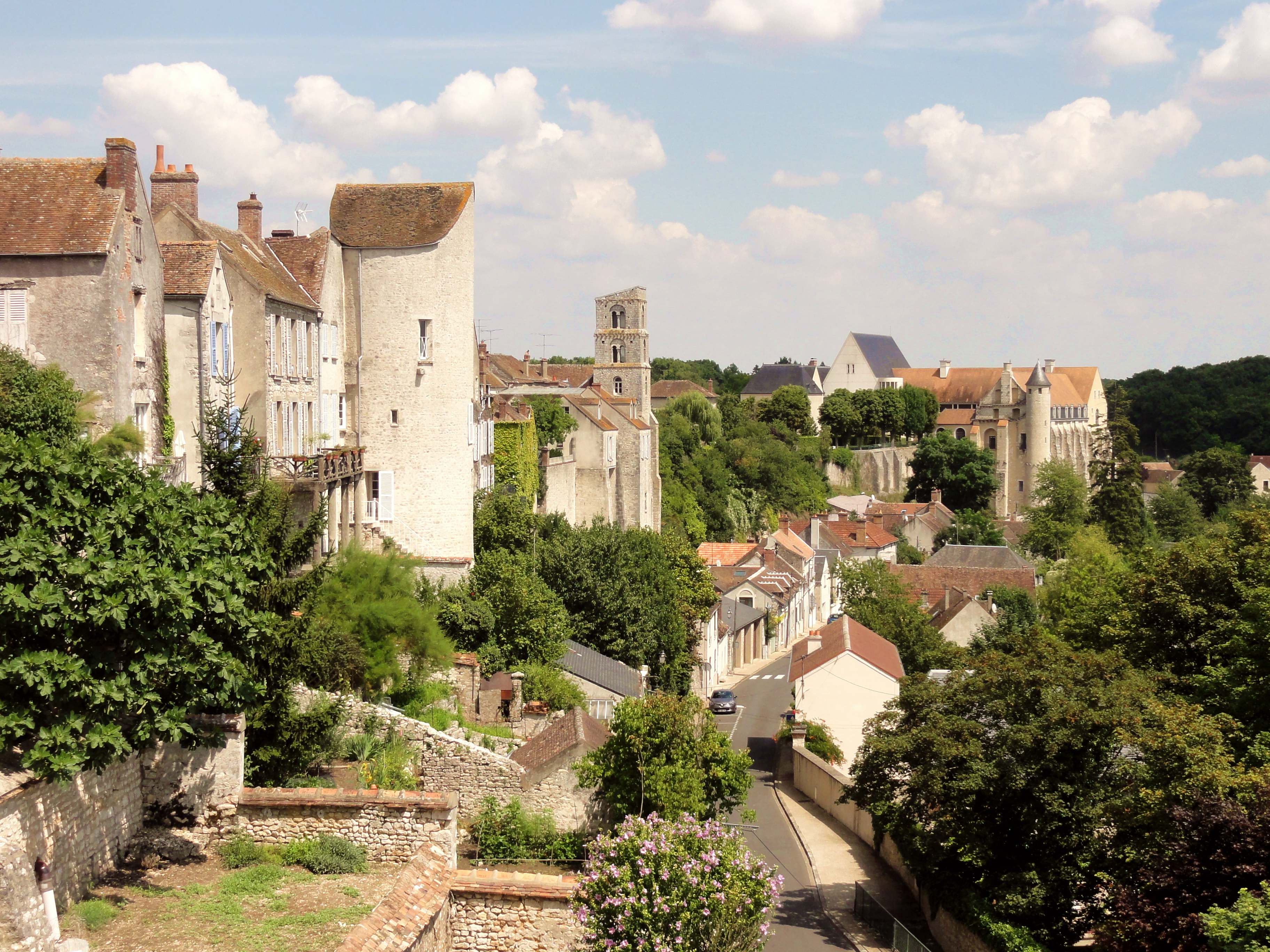 Panorama depuis la place du Larry, vue vers l'est.